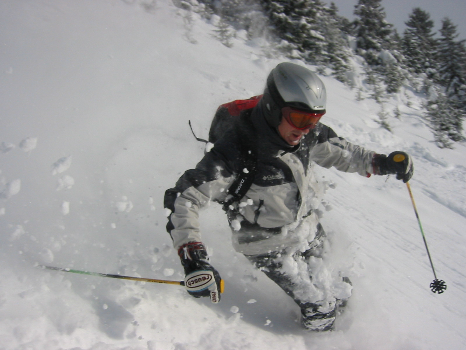 Skieur Freeride. Photo realisée à Meribel